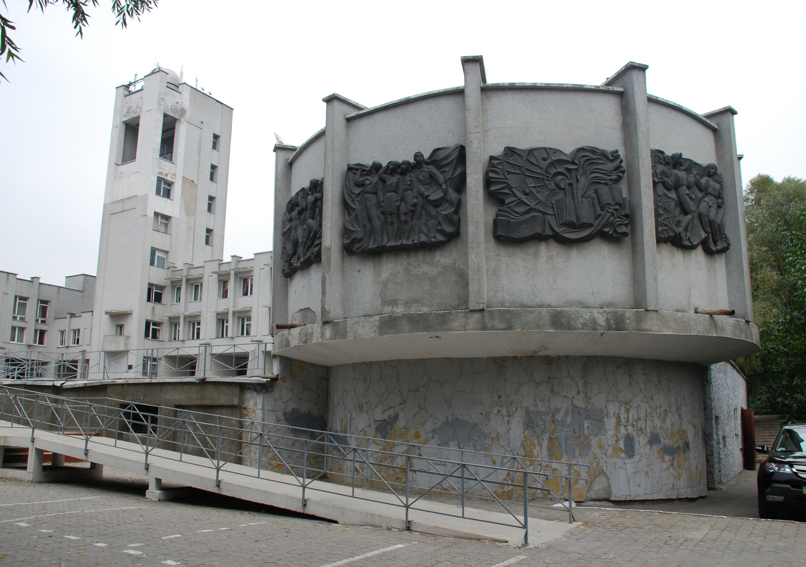 Здание панорамы "Освобождение Проскурова" (на переднем плане). г. Хмельницкий (Украина), ул Свободы, 2/1